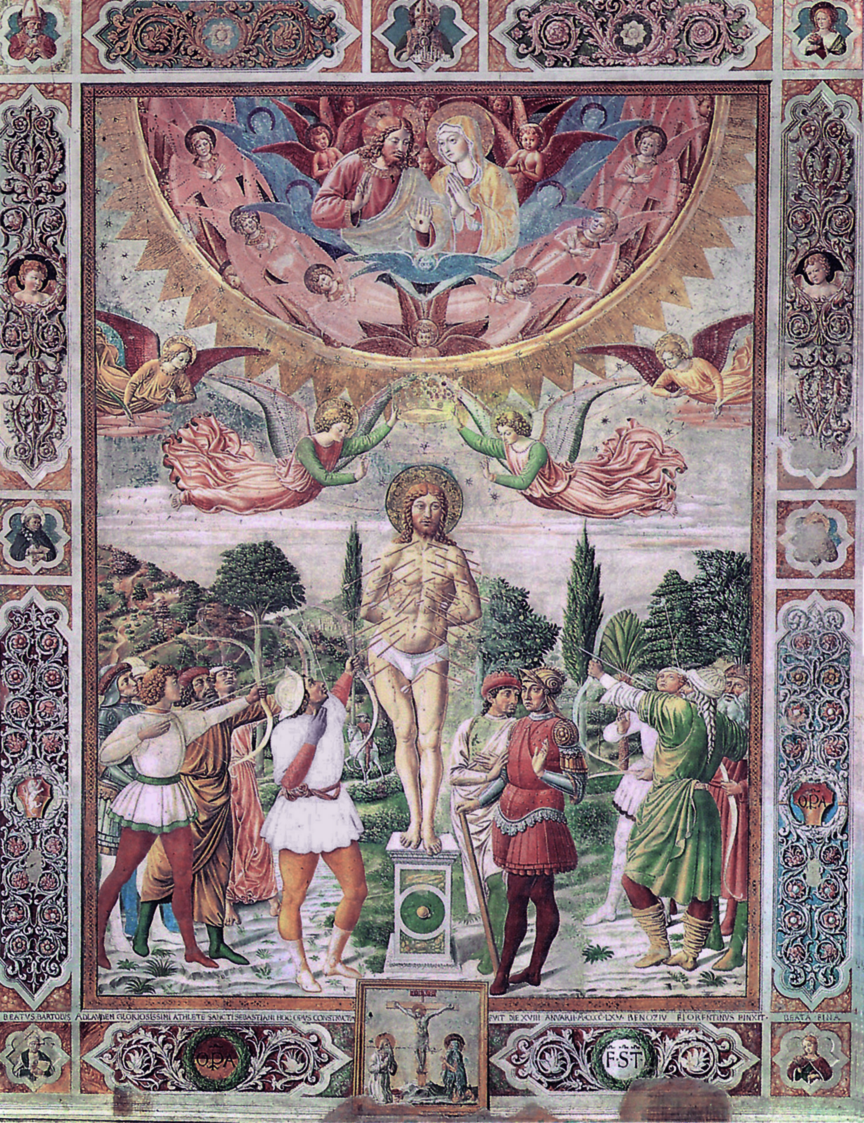 Martirio di San Sebastiano, opera di Benozzo Gozzoli, Duomo di San Gimignano